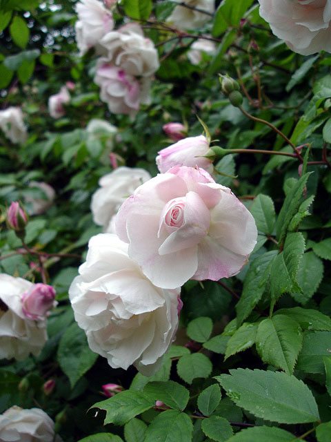 Rosa Ayrshire 'Venusta Pendula'